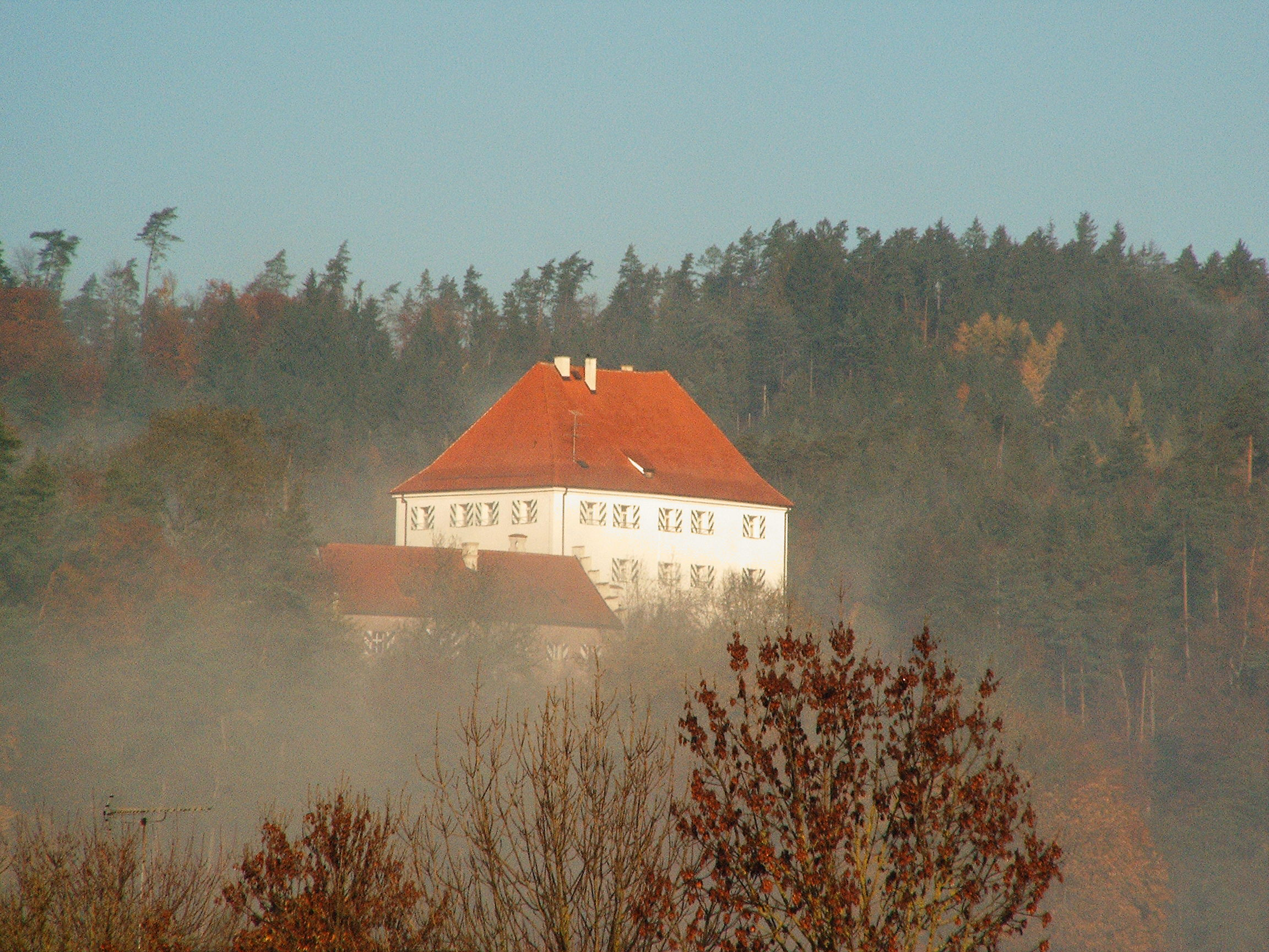 Schloss Stefling im Nebel. Aufgenommen aus Richtung Hof am Regen